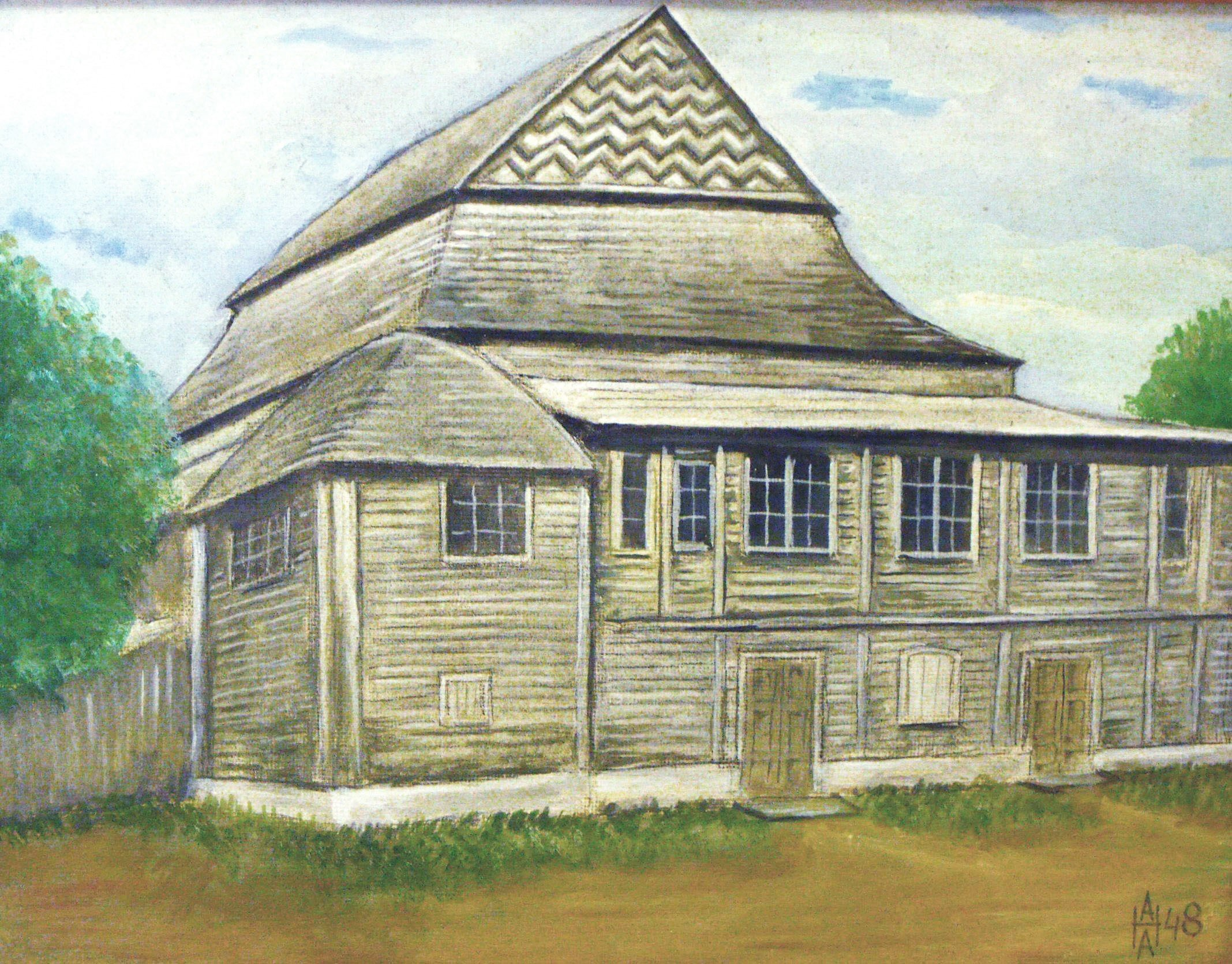 Синагога в Гродно в занеманском предместье, 1948 год. Сделано по акварели 1948 года в 1963 году. Яичная темпера. ДВП. Художник Анатолий Александрович Наливаев.